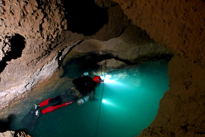 Alperdo (Aulesti), 2010eko martxoaren 21a. ADES Espeleologia Elkarteko urpekariak (Ricardo Gutierrez eta Antonio Garcia) kobako "zenotea" esploratzen.